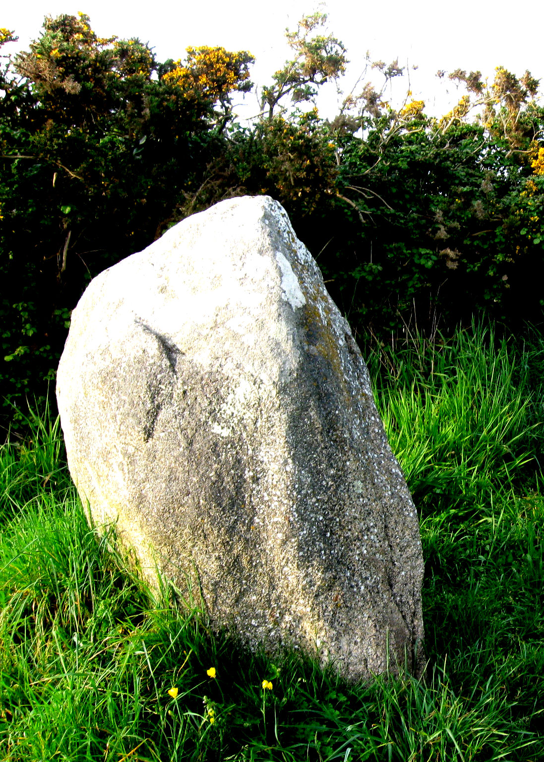 Menhir von Guiliguy, Portsall, Finistère